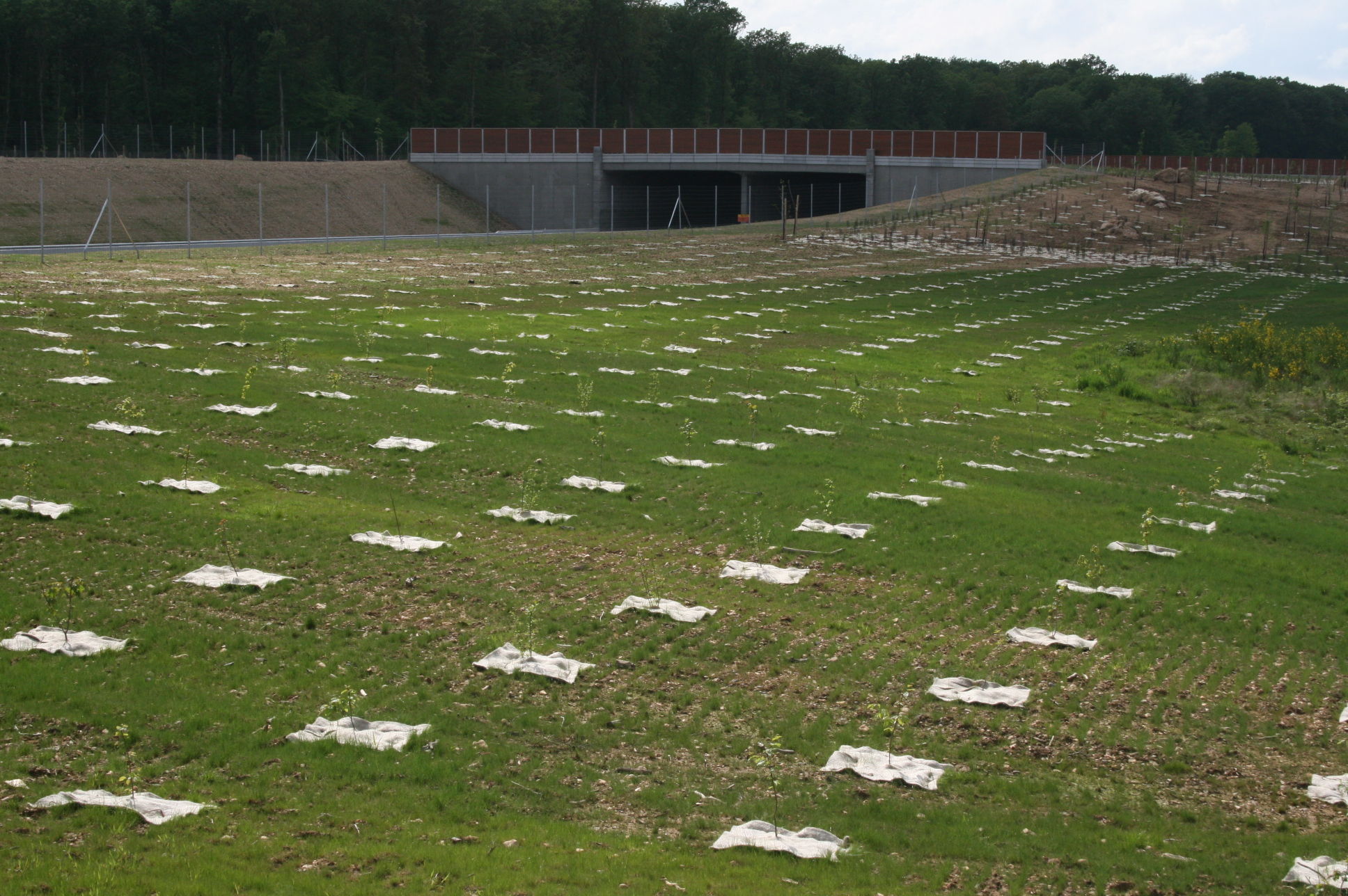 Autoroute A19 – Plantations au droit de la RD 115 - cliché du 13 mai 2009